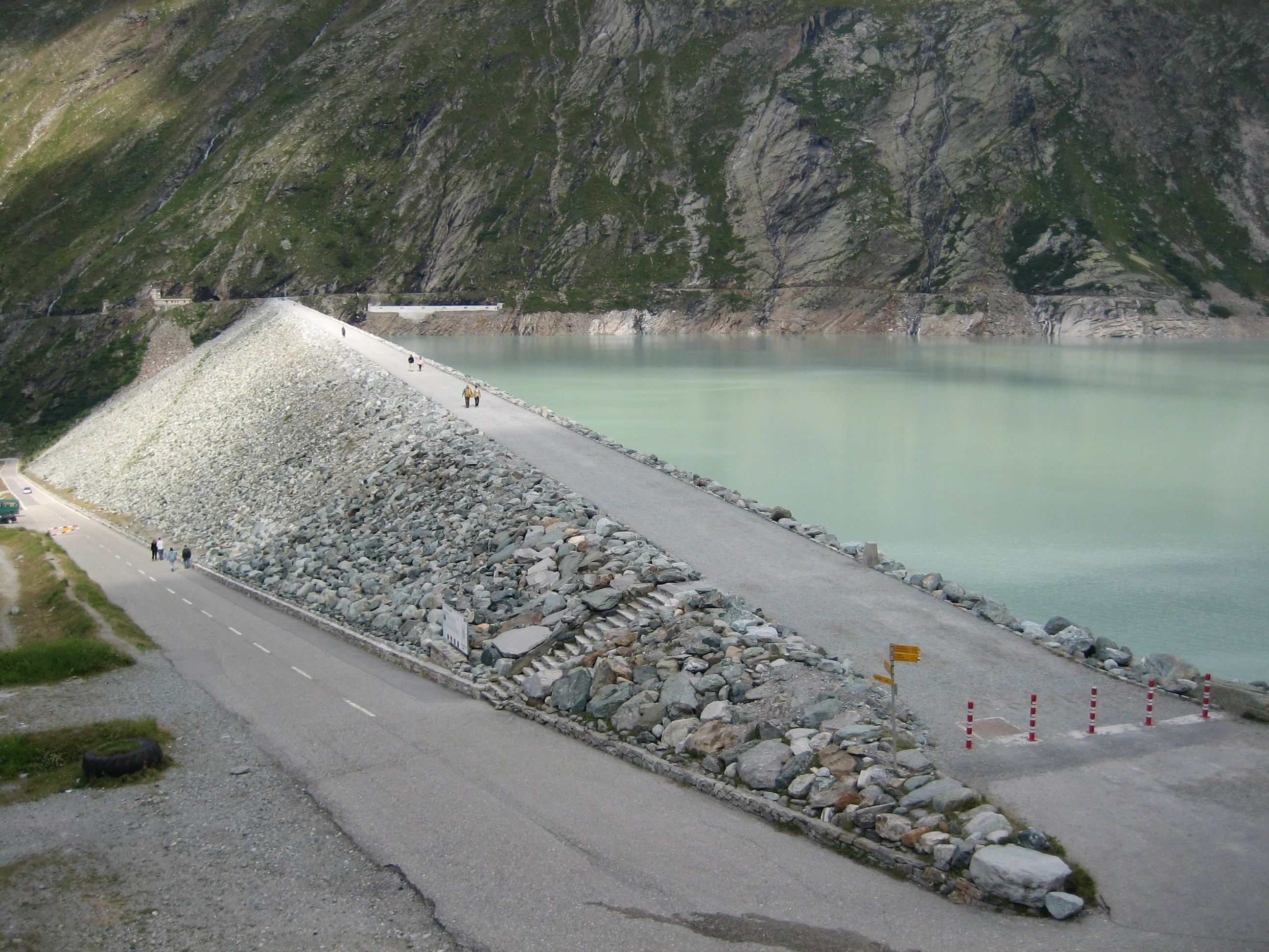 Barrage de Mattmark en Valais